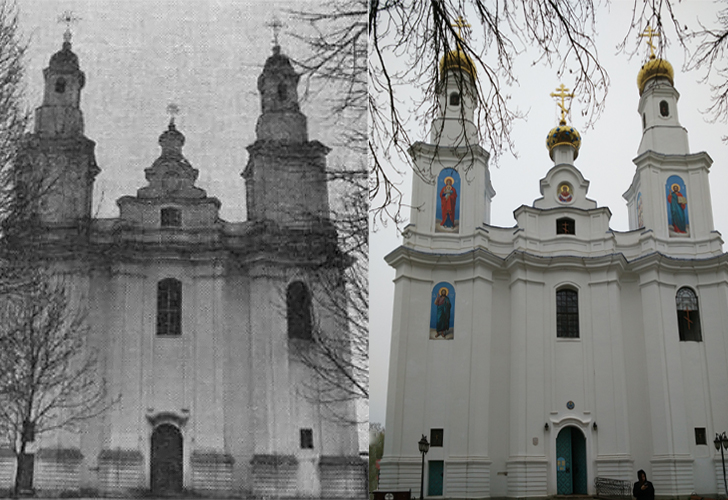 Беларуская (тарашкевіца): Маскалізацыя (русіфікацыя) Вялікага Княства Літоўскага. Места Талачын Аршанскага павету. Пакроўская царква, помнік архітэктуры віленскага барока: аўтэнтычны выгляд (налева) і па частковым руйнаваньні ў выніку маскоўскай перабудовы (направа)